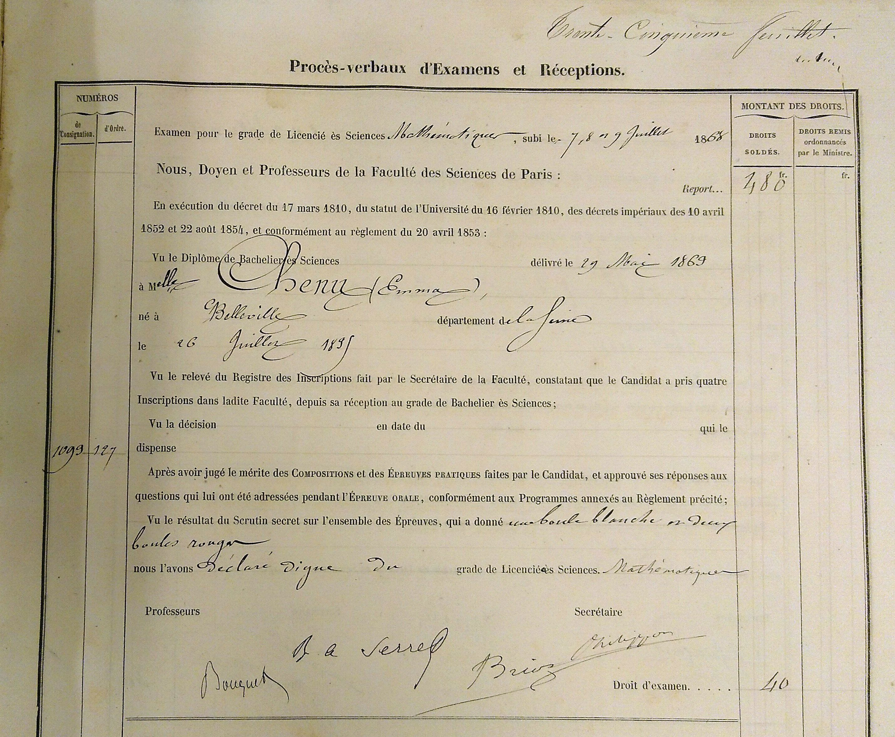 Procès-verbal de réception du diplôme d'Emma Chenu, première française à être diplômée d'une licence (ès sciences mathématiques, Faculté des sciences de Paris), juillet 1868. Archives nationales, cote AJ/16/5486.